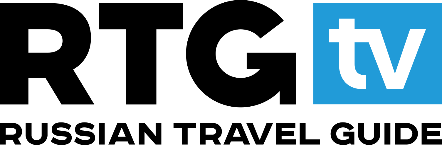 Новый логотип канала Russian Travel Guide